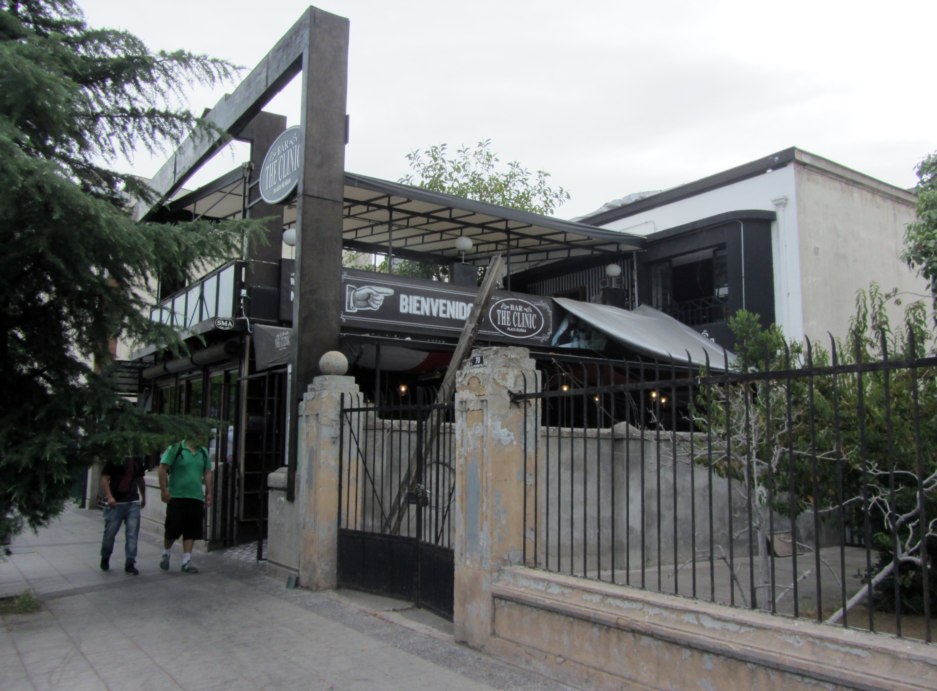 Bar The Clinic, con el emblema del irreverente semanrio del mismo nombre en la calle Jorge Washington, a un costado de la Plaza Ñuñoa.